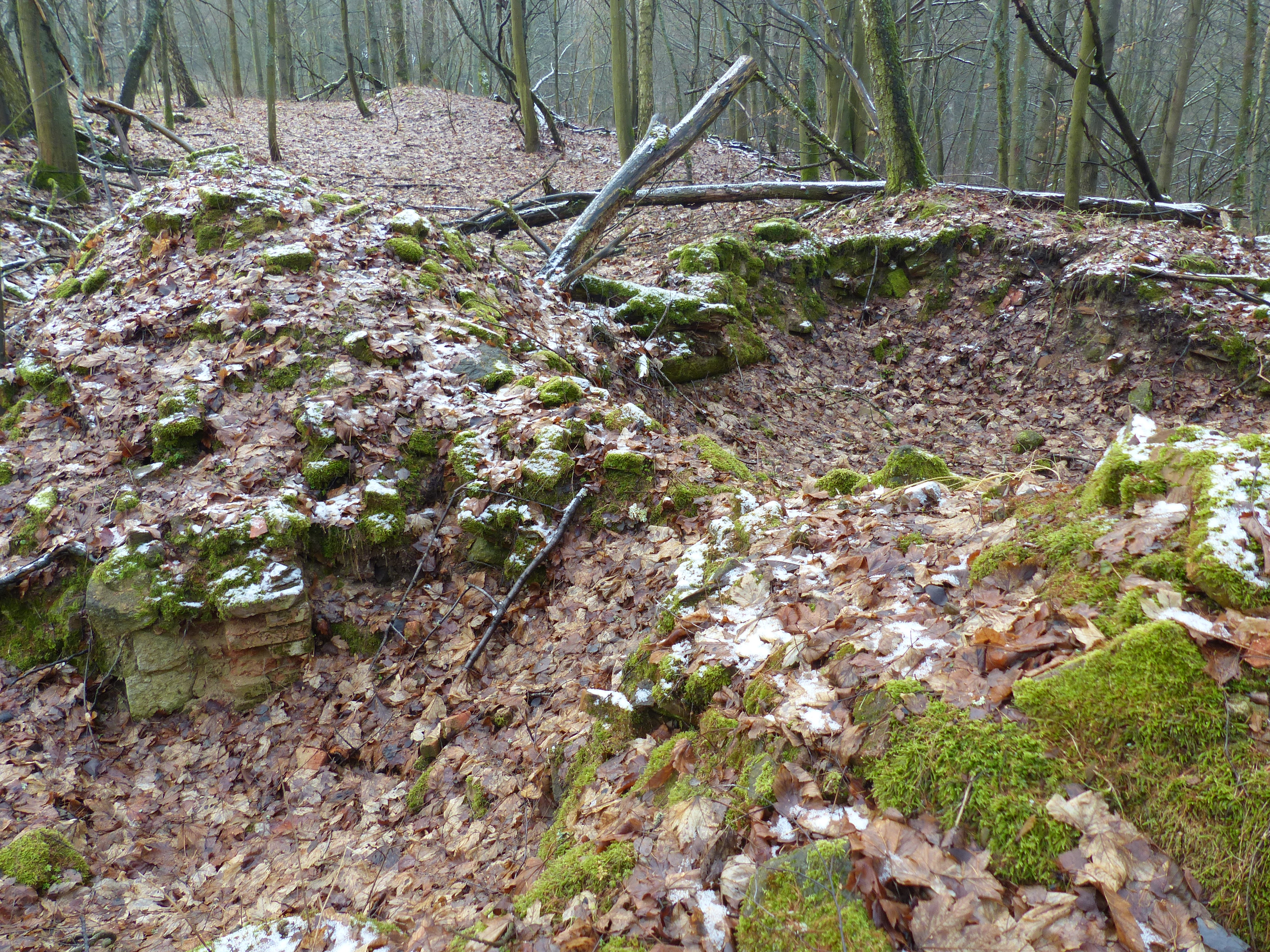 Wüstung Ottengrün bei Haslau, Fundamentreste